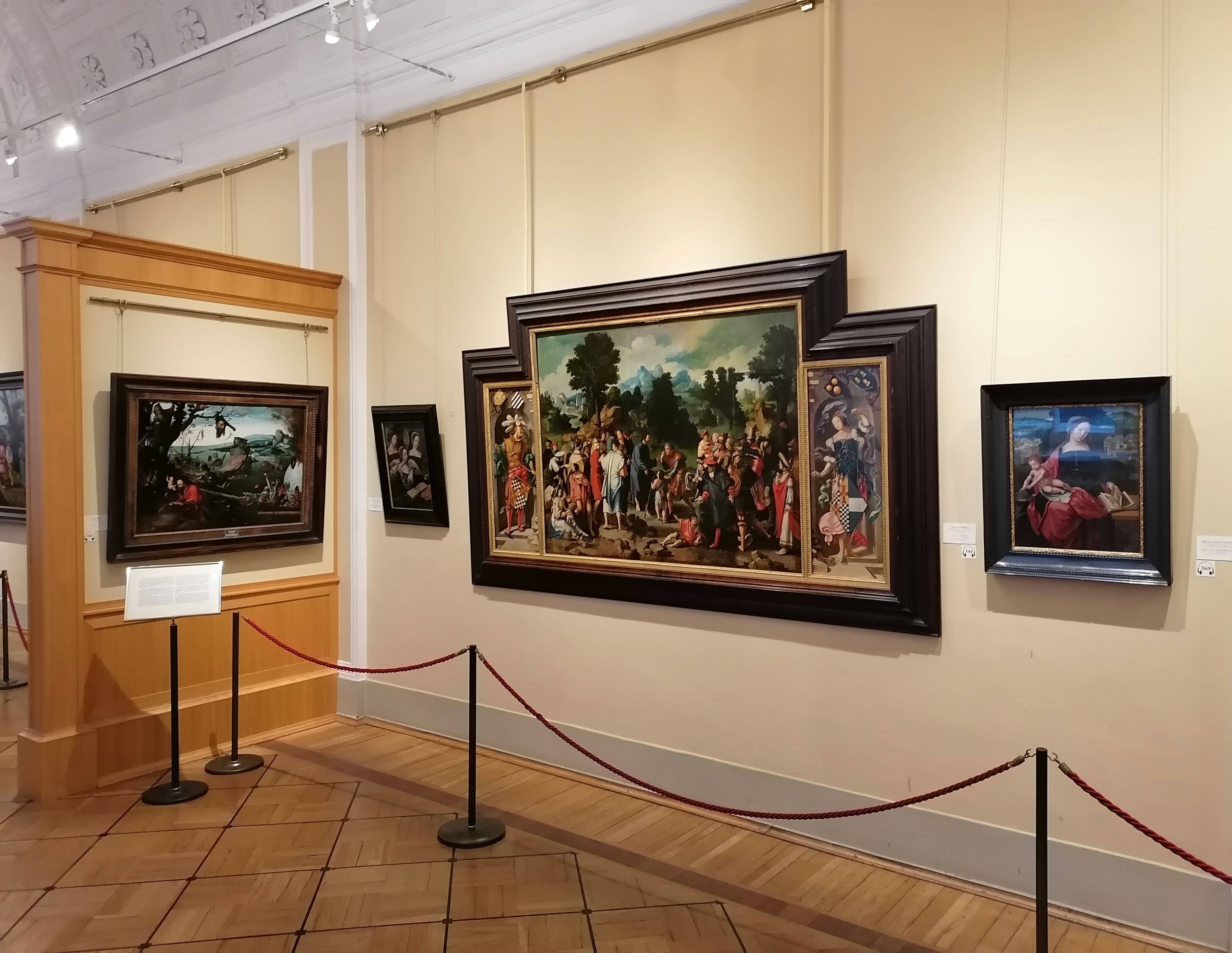 Малый Эрмитаж - зал 262